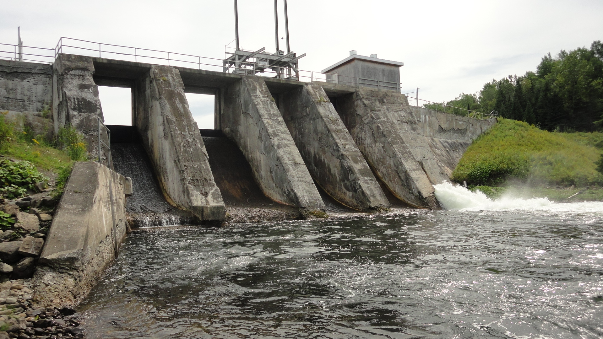 Barrage Mitis qui permet de retenir le Lac Mitis situé sur le territoire non-organisé de Lac-des-Eaux-Mortes, à la tête de la rivière Mitis